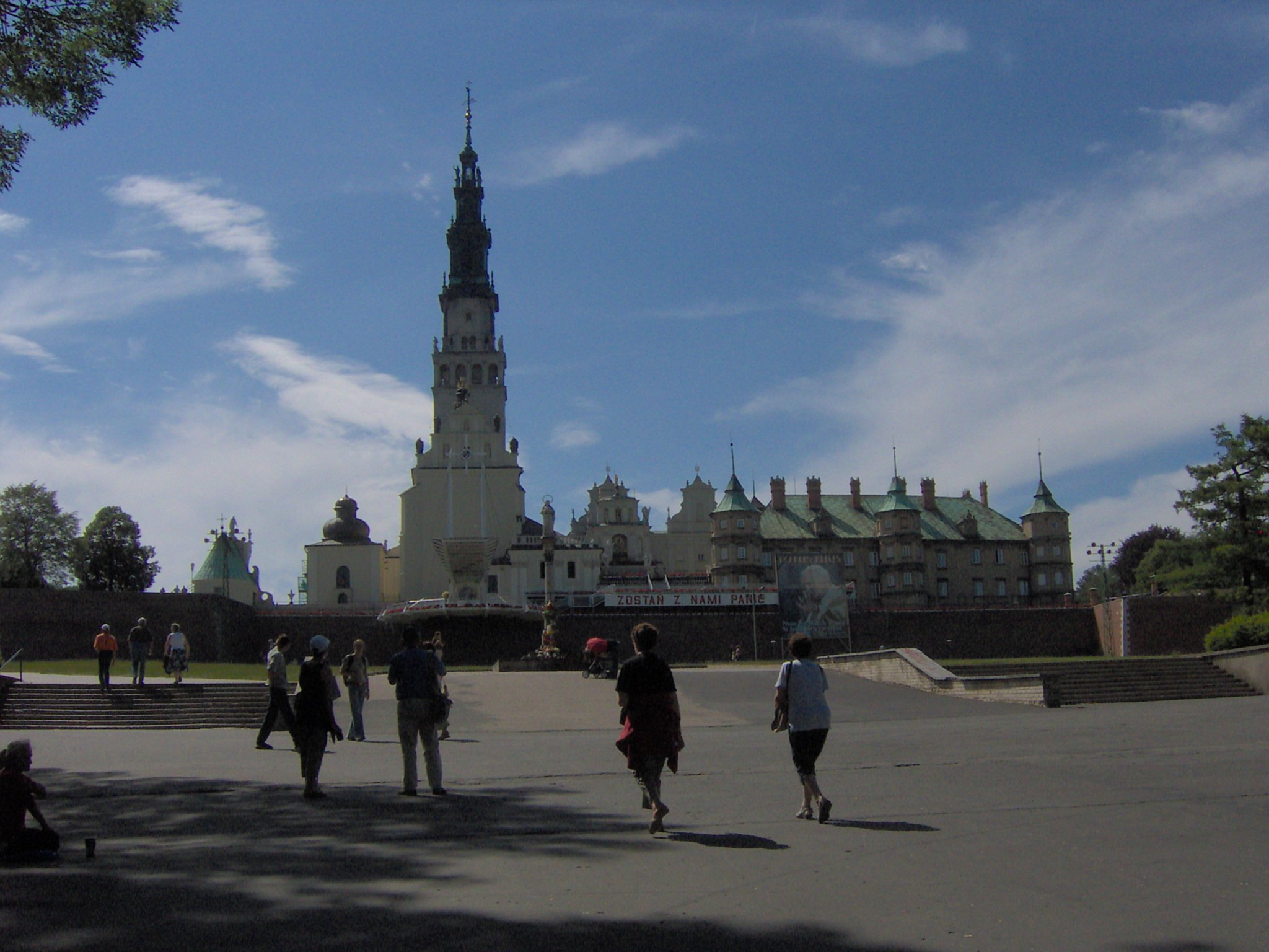 Kompleks klasztorny na Jasnej Górze